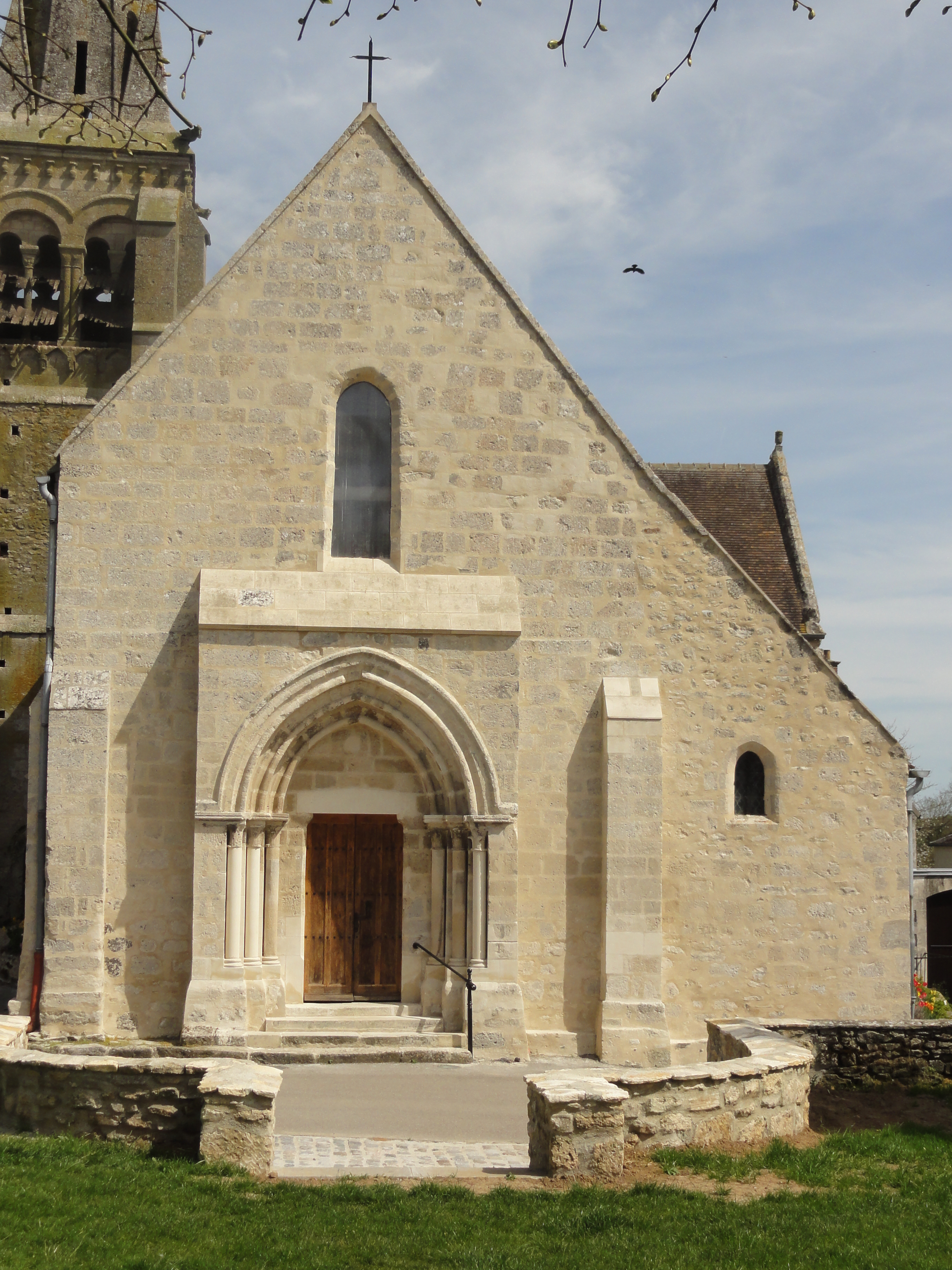 Église Saint-Caprais d'Auger-Saint-Vincent (voir titre).